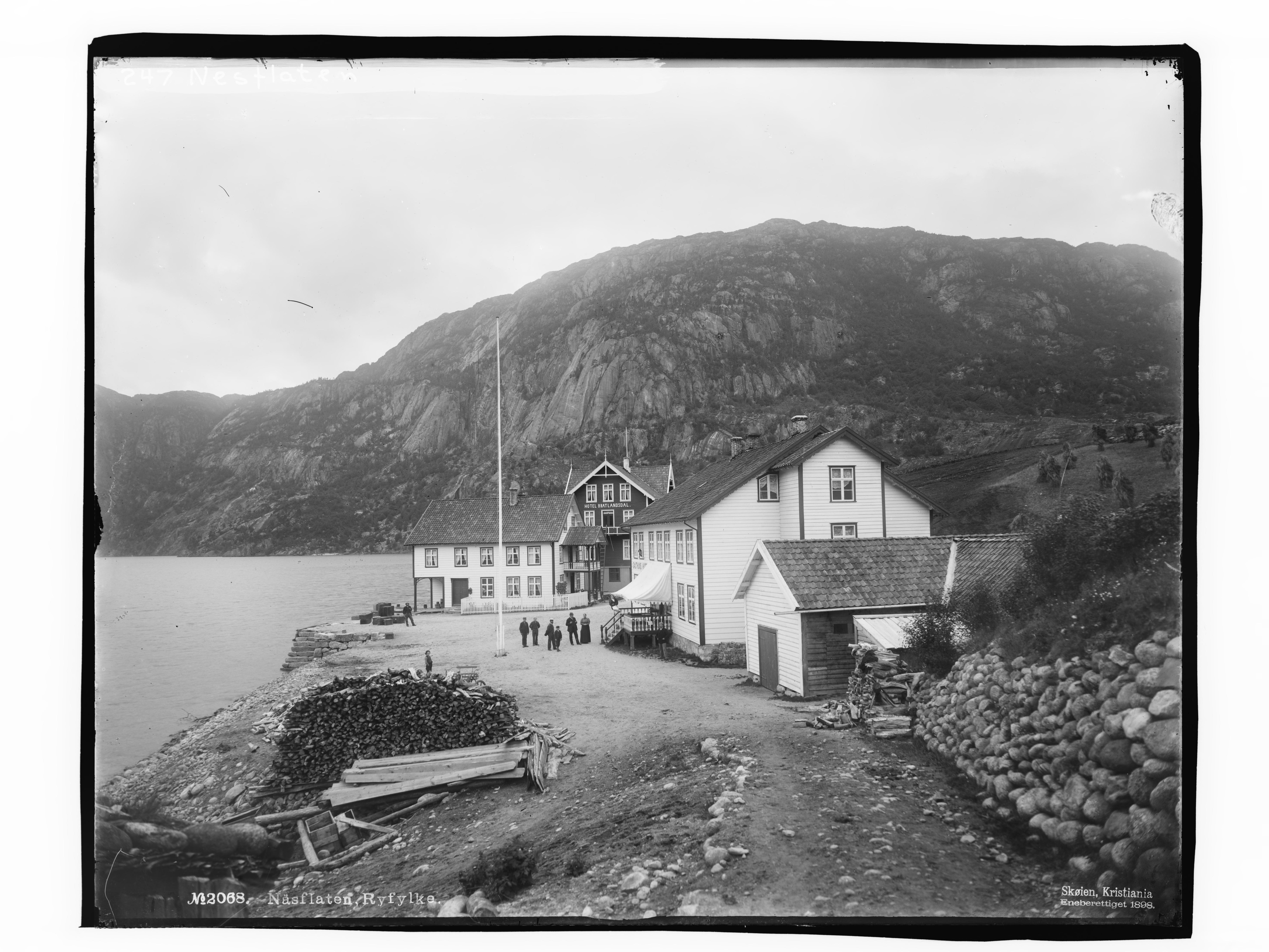 Påskrift negativ: No2068. Näsflaten, Ryfylke. Skøien, Kristiania Eneberettiget 1898. Påskrift negativ: 247 Nesflaten [Riksantikvaren] Påskrift konvolutt: B-247 Suldal. Hotel Bratlandsdal m.m. Nesflaten[Riksantikvaren] [Negativet er eksponert med speilvendt resultat. Rettet opp.] Sted: Nesflaten,Ryfylke,Suldalsvatnet Kommune: Suldal Fylke: Rogaland Tagger: landskap grend innsjø Hotel Bratlandsdal hotell